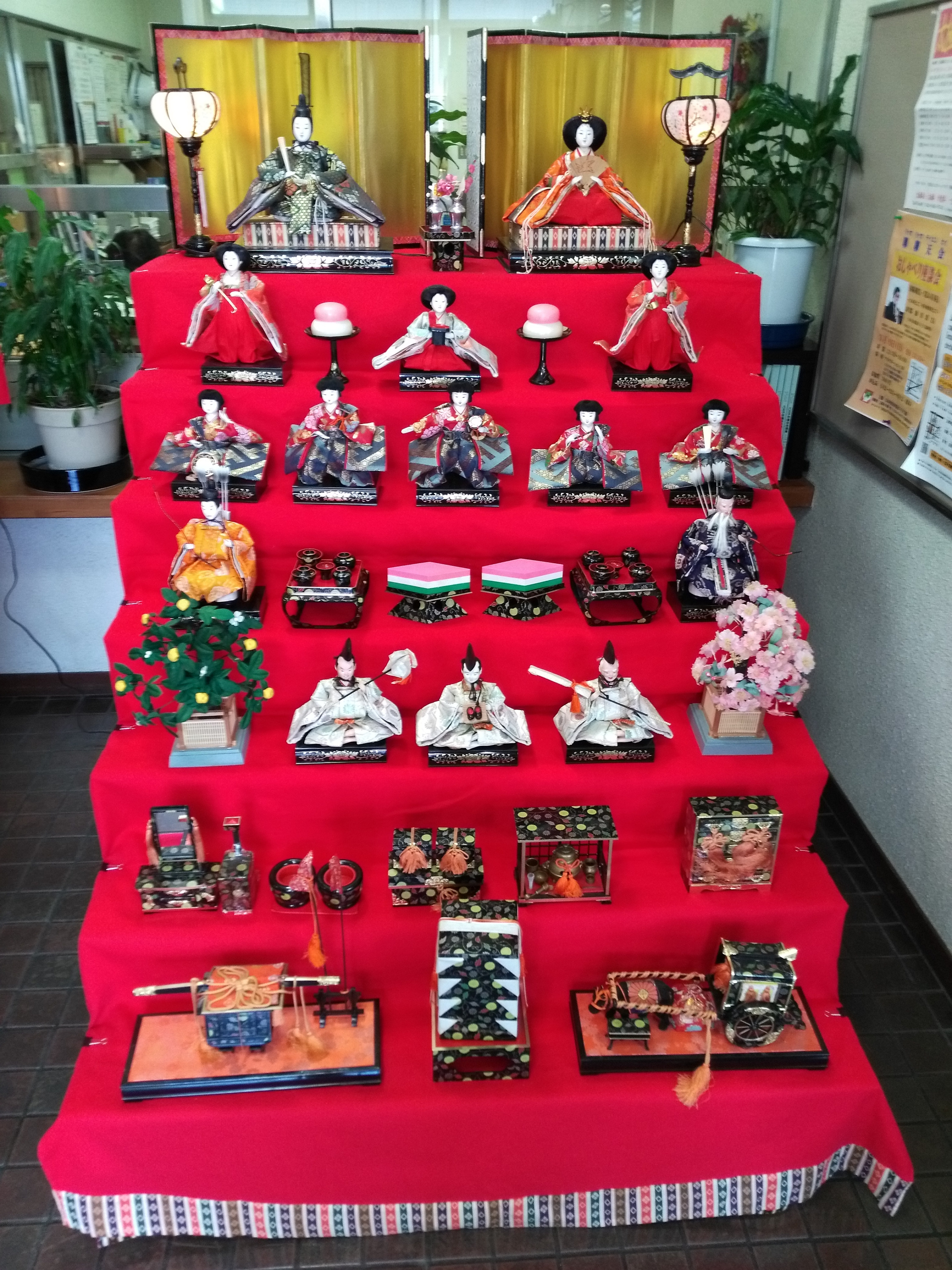 日本の雛祭りの雛人形、節句、年中行事